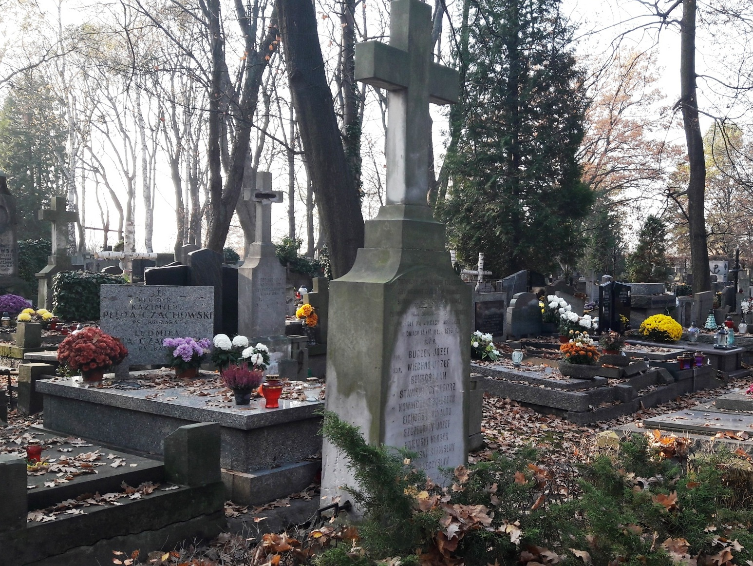 Pomnik żołnierzy 10 pułku piechoty, poległych 13-14 maja 1926 r. w walkach zamachu majowego w Warszawie, na Cmentarzu Wojskowym na Powązkach. W tle grób płk dypl. Kazimierza Pluty-Czachowskiego, szefa sztabu 18 DP we wrześniu 1939 r.